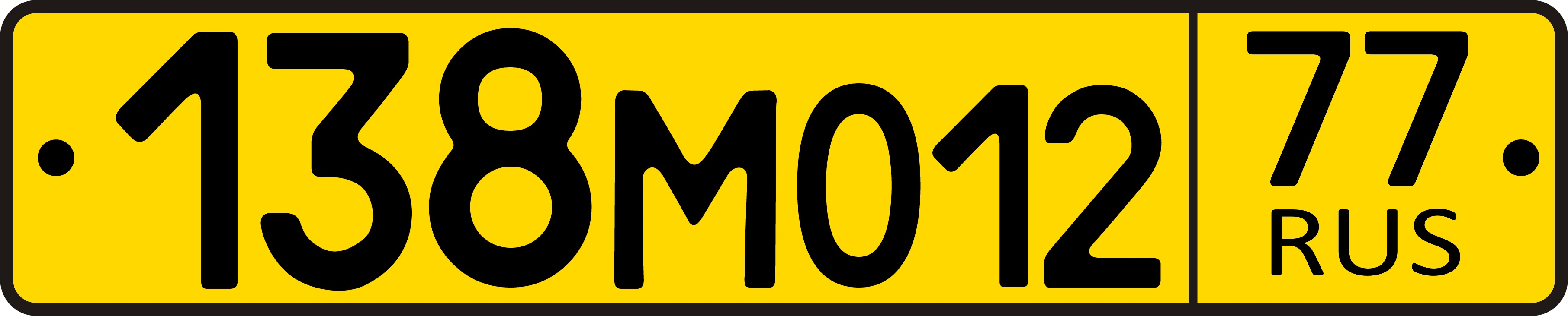 Российский автомобильный номер, выдававшийся иностранным гражданам в 1994-1998 годах